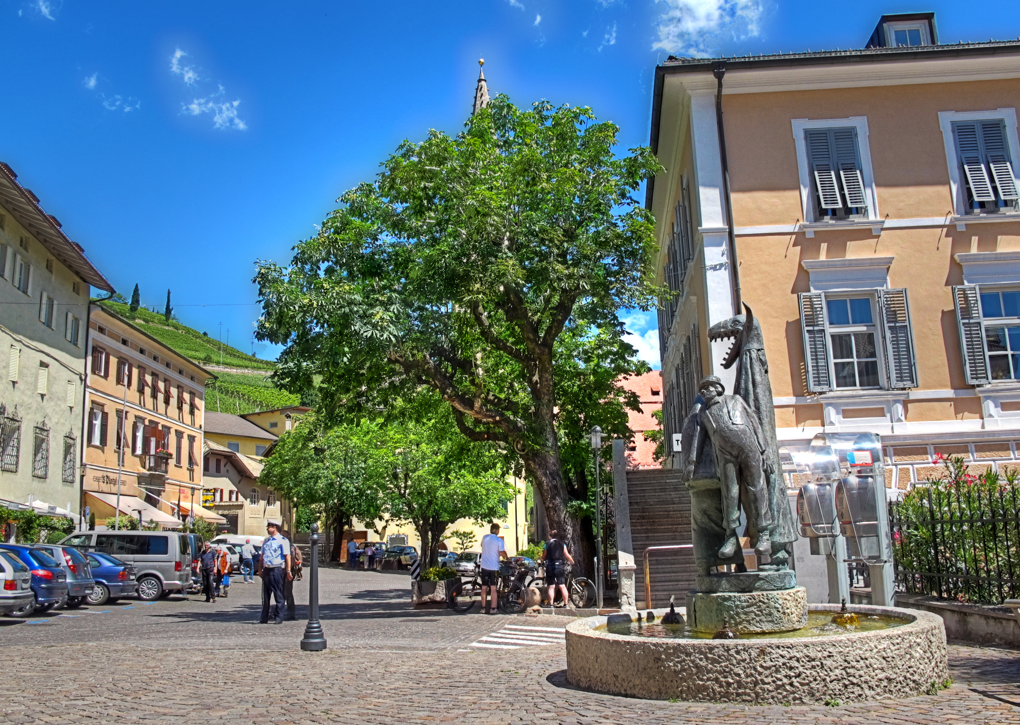 Italien, Südtirol, Tramin, Marktplatz, Rathaus, Egetmann-Standbild/Brunnen, HDR-Image